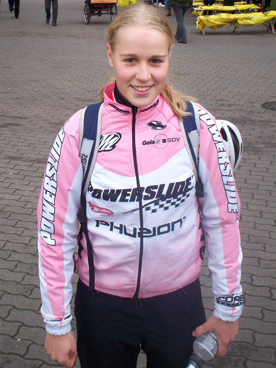 Berliner Halbmarathon 2008